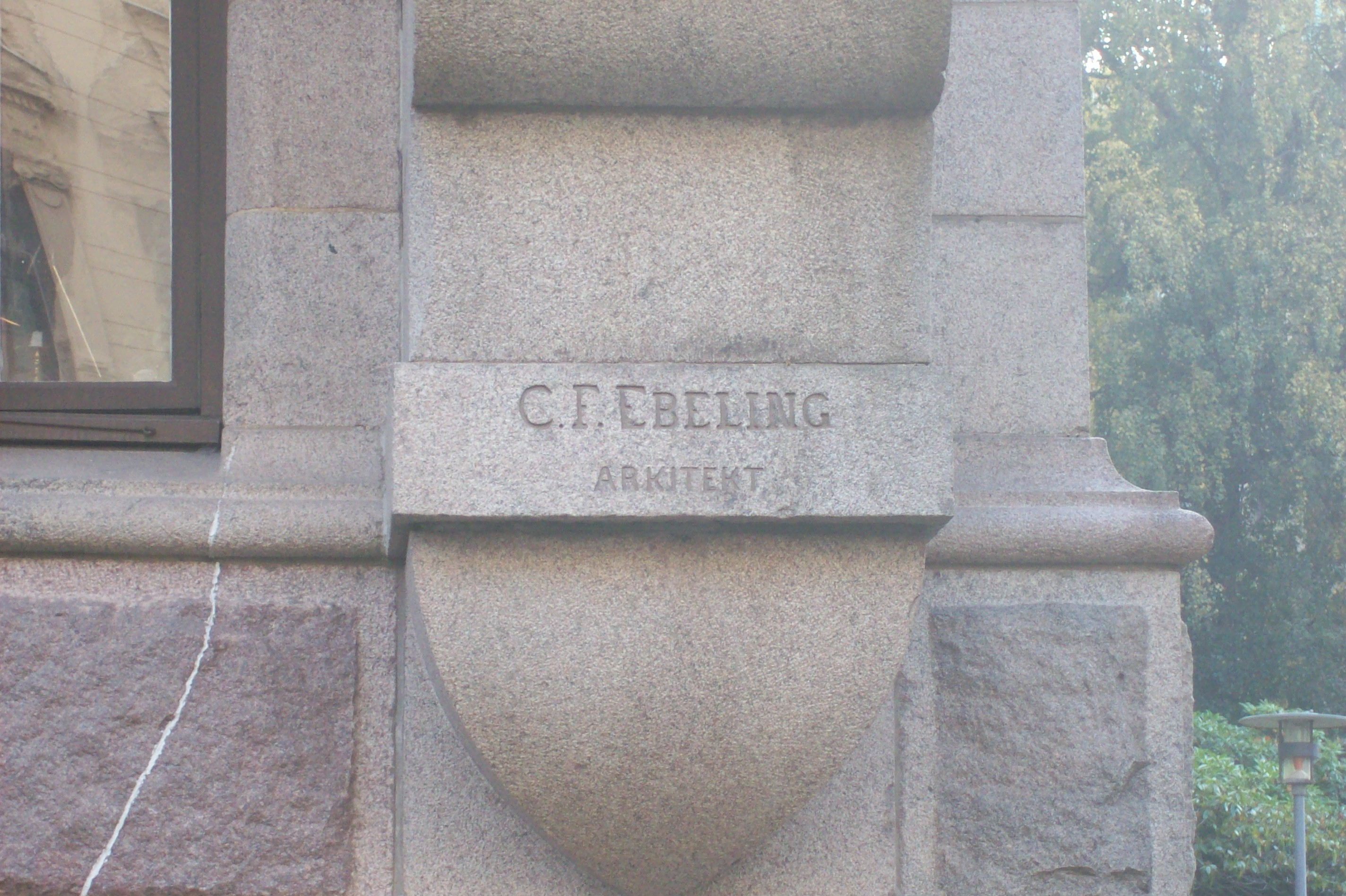 Göteborg Vasastaden 12:8, kvarteret Furan. Inskription: C.F. Ebeling Arkitekt.